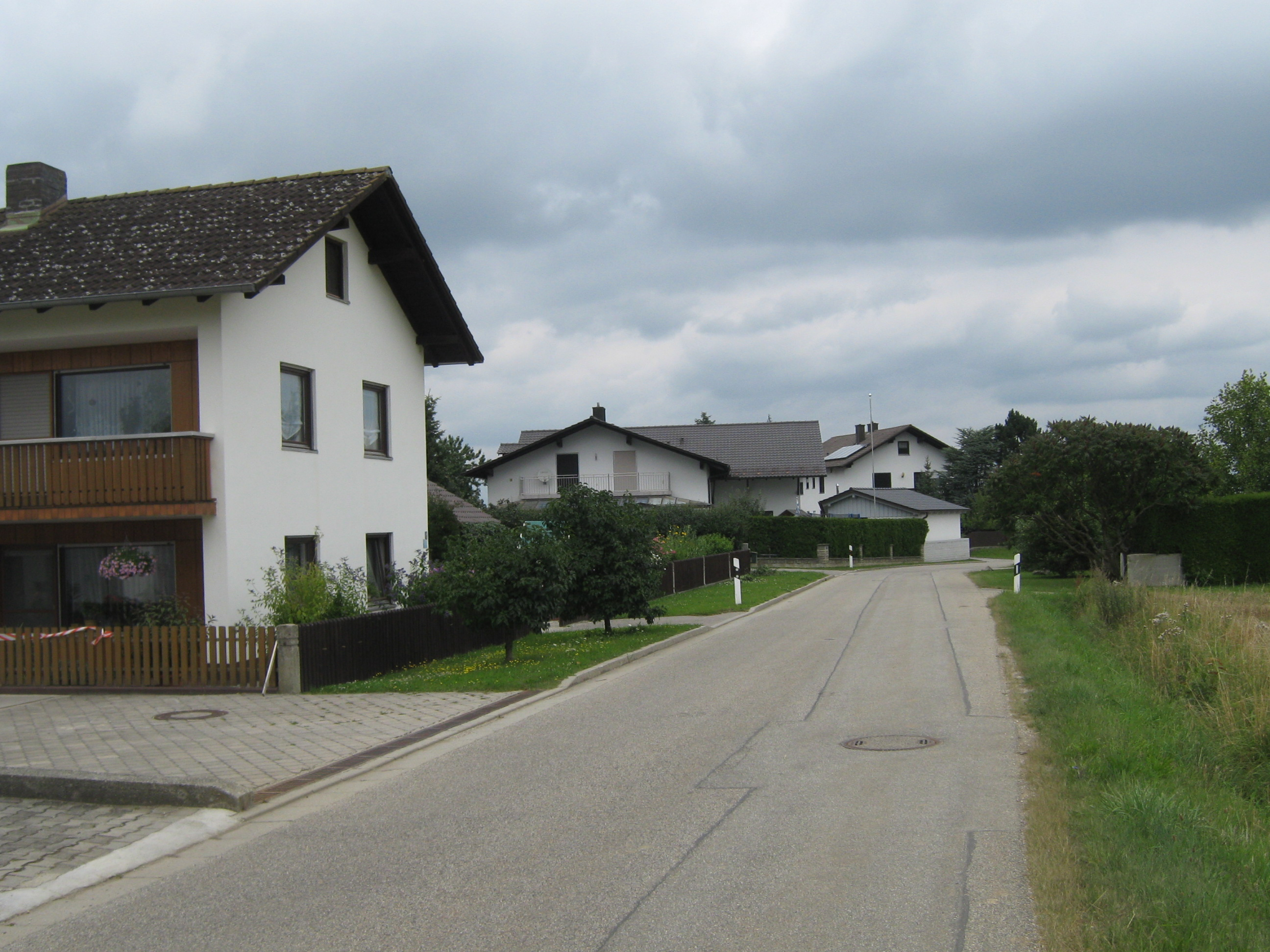 Der Weiler Ödhäusl oberhalb von Brunn, Stadt Dingolfing, Niederbayern Blickrichtung Norden